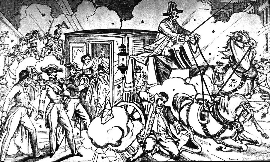 explosion de la seconde bombe sous la berline impériale